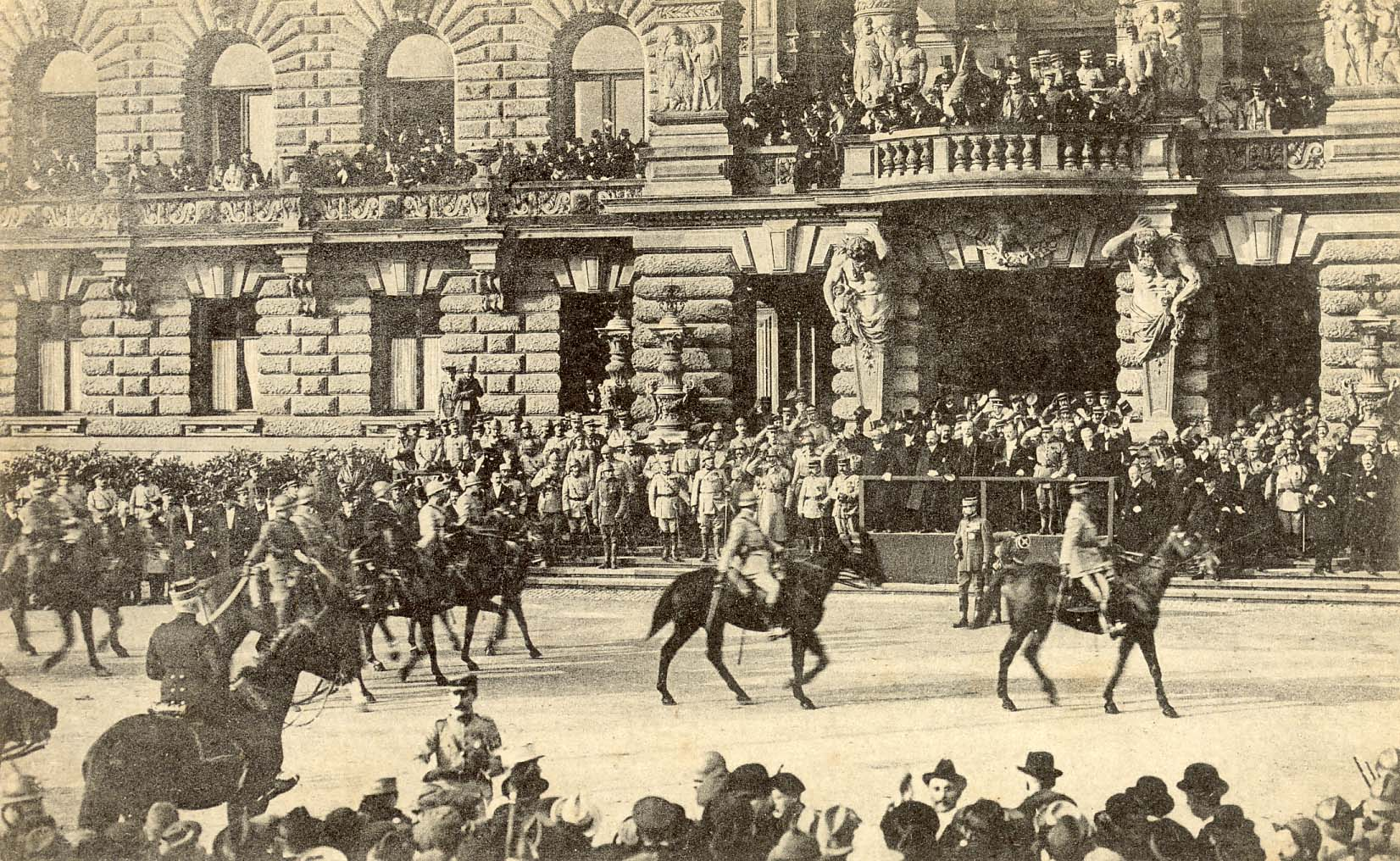 Entrée de la quatrième armée française menée par le général Gouraud à Strasbourg le 22 novembre 1918.